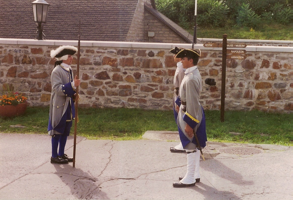 Troupes de la Marine, Fort de l'Île Sainte-Hélène, Montréal